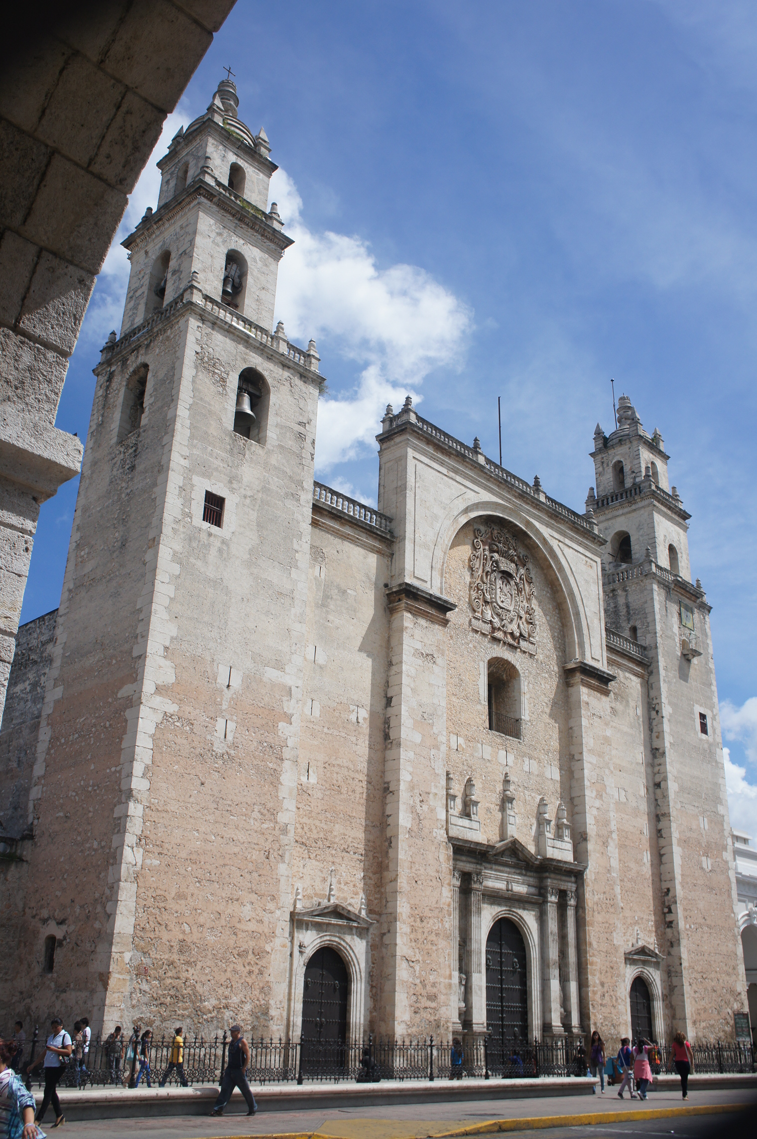 Iglesia localizada en el zócalo de la ciudad de Mérida Yucatán